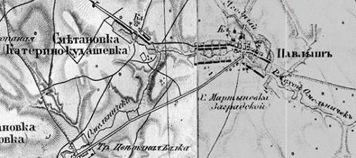 Павлиш з околицями на військово-топографічної карти Шуберта та Тучкова 1869 року